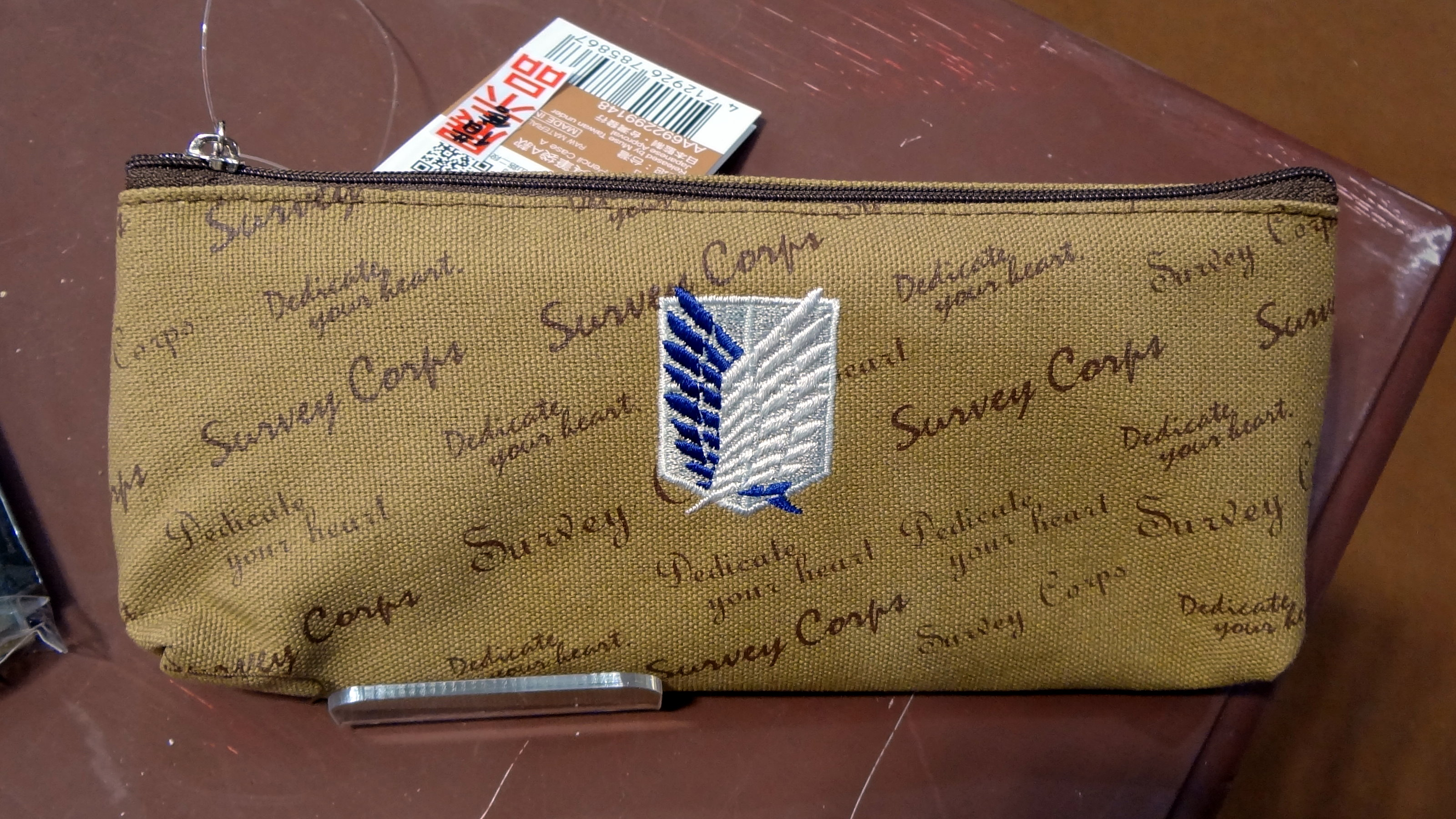 動漫爭艷嘉年華展區，木棉花國際《進擊的巨人》「軍卡其筆袋A款」展示品。